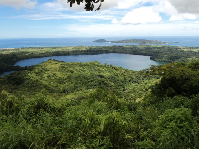 vue depuis le mont Passot, point culminant de l'île de Nosy Be, en contrebas de la photos, l'un des trois lacs du mont Passot.